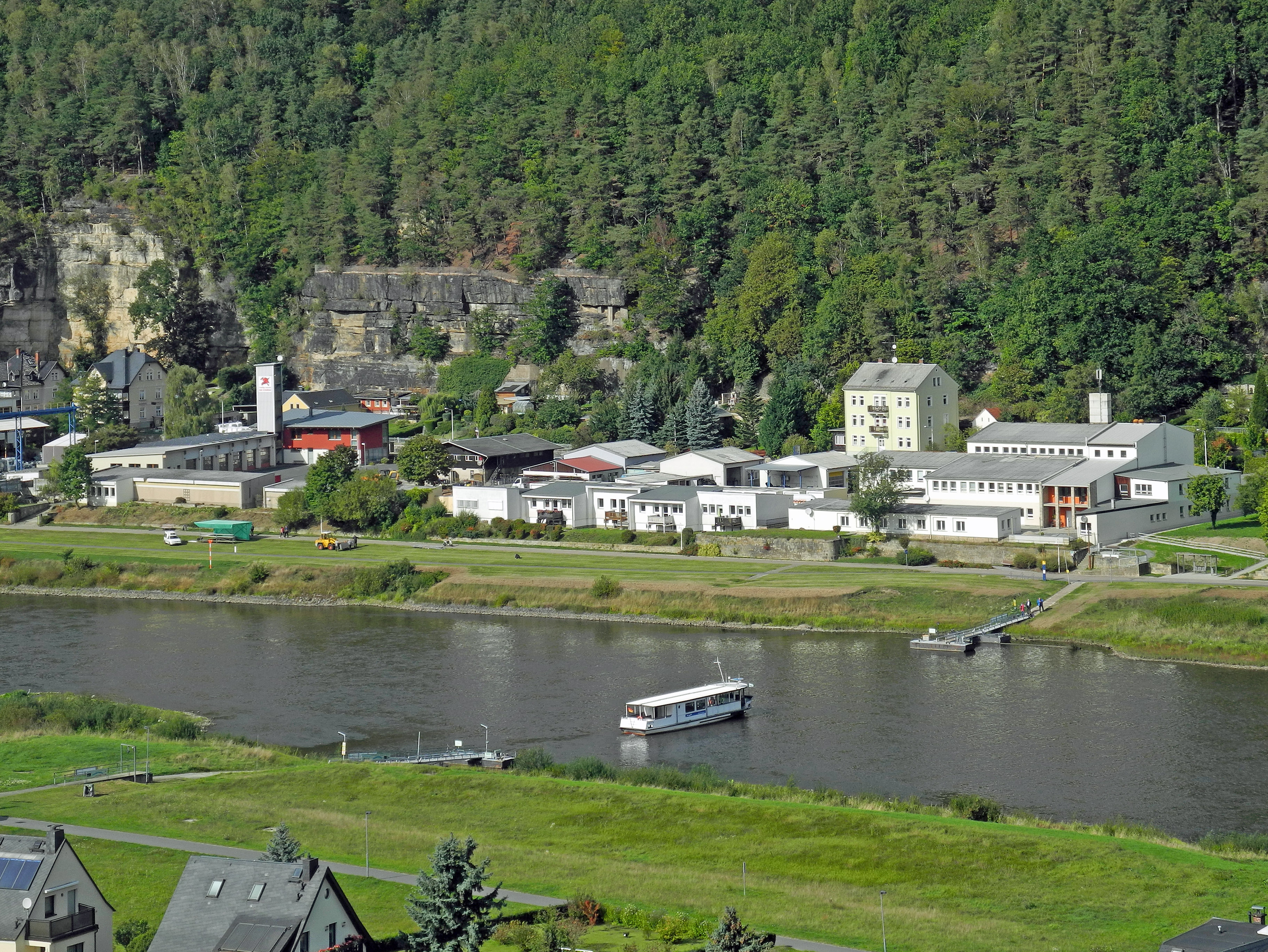 Blick von der Carolahöhe in Krippen nach Postelwitz, Elbleite 1 und 2